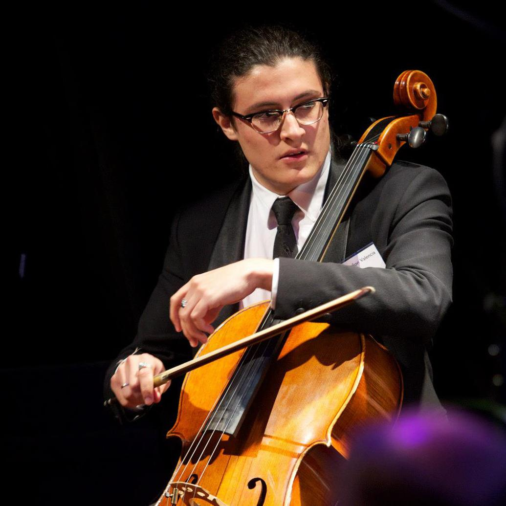 Santiago Cañón